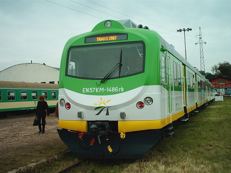 Elektryczny zespół trakcyjny EN57KM-1486, zmodernizowany przez ZNTK Mińsk Mazowiecki dla Kolei Mazowieckich, podczas prezentacji na targach Trako 2007 w Gdańsku.